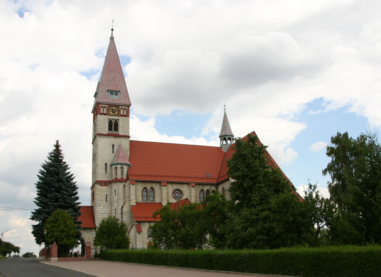 Ligota Bialska 1 - rzymskokatolicki kościół parafialny p.w. św. Stanisława Biskupa i Męczennika.